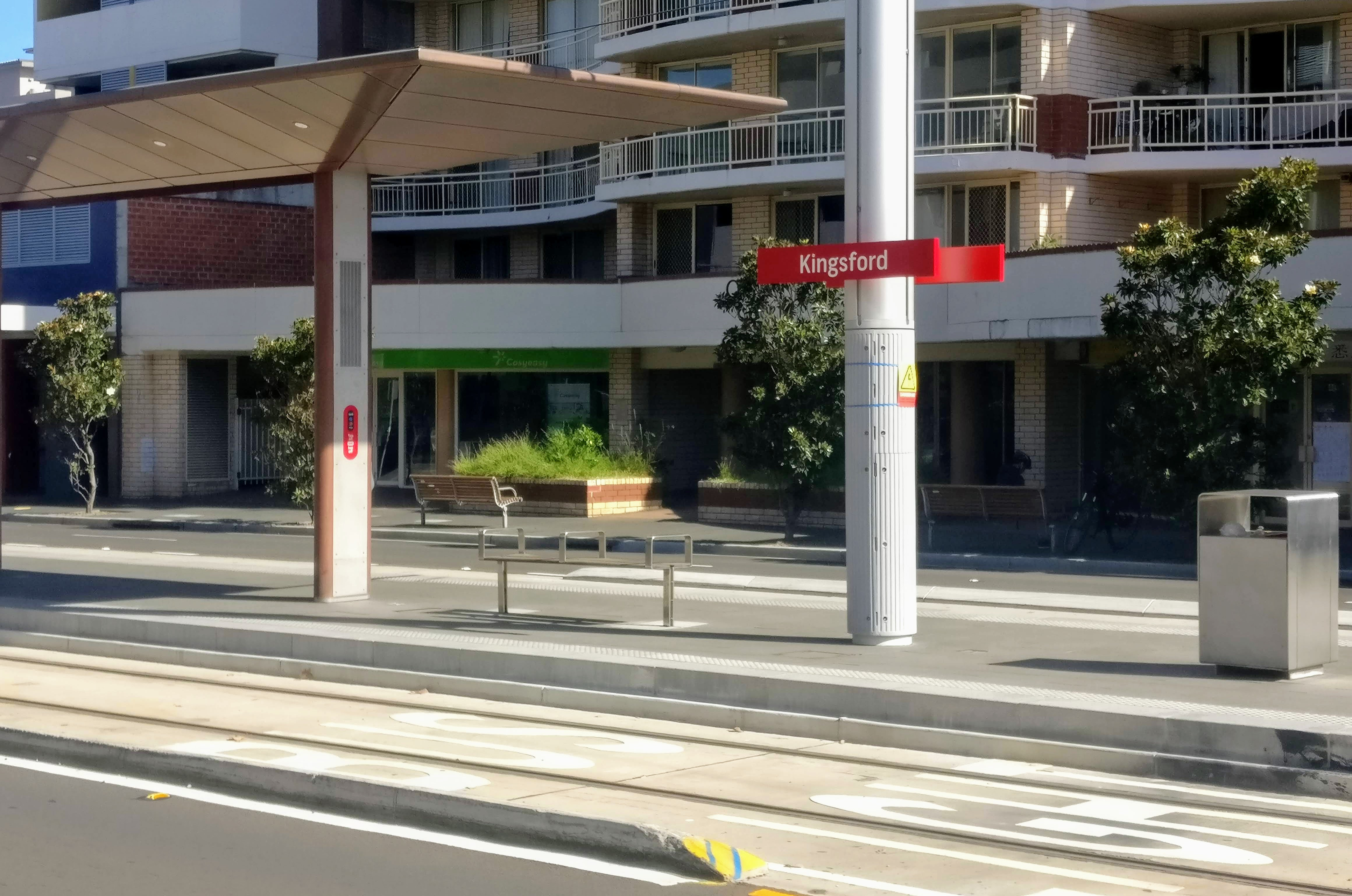 Kingsford的轻轨站